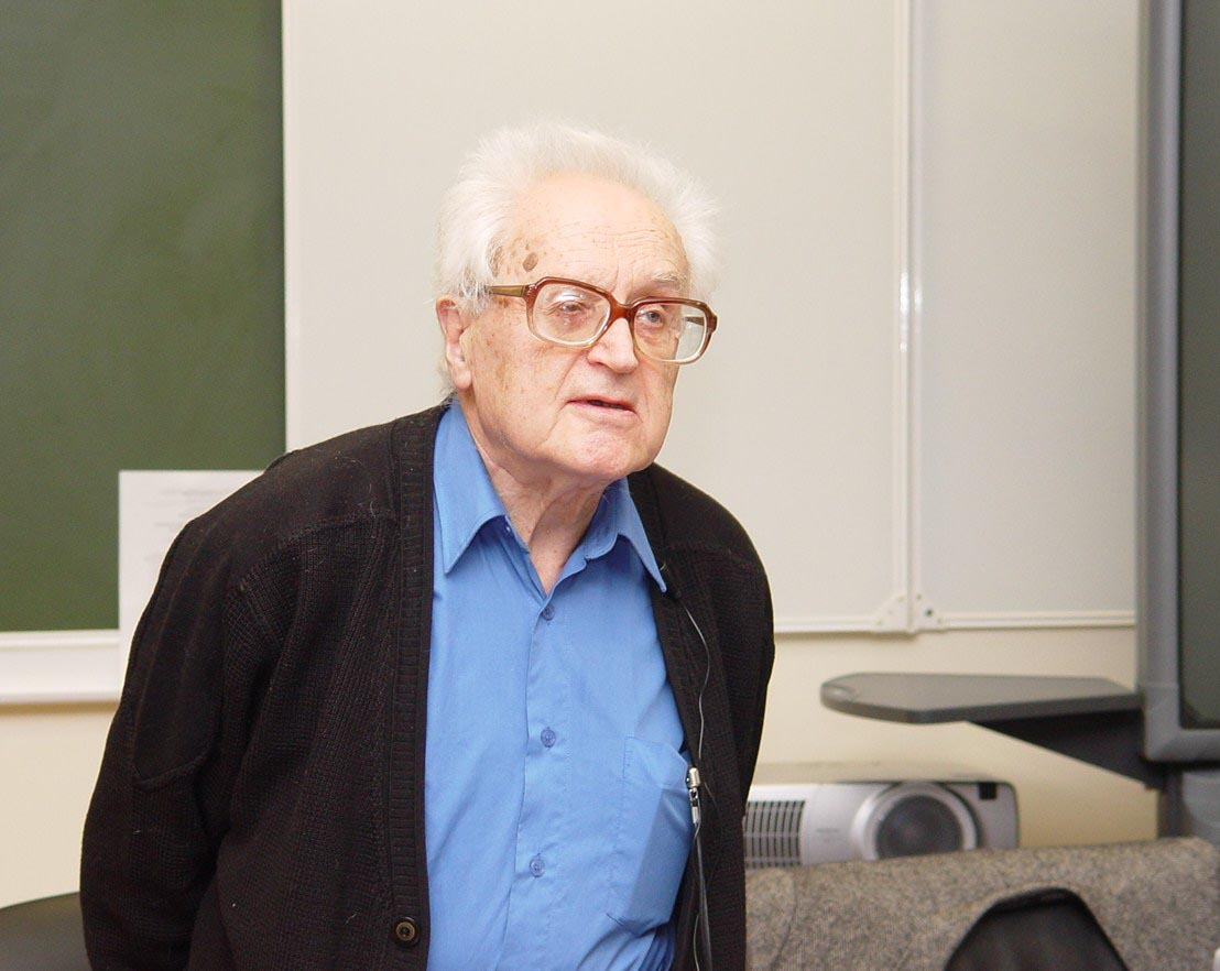 Фото Георгия Александровича Багатурия.